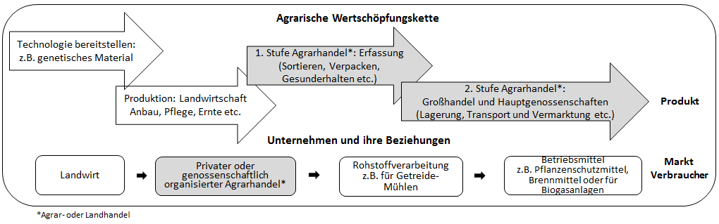 Position des Agrarhandels in der agrarischen Wertschöpfungskette